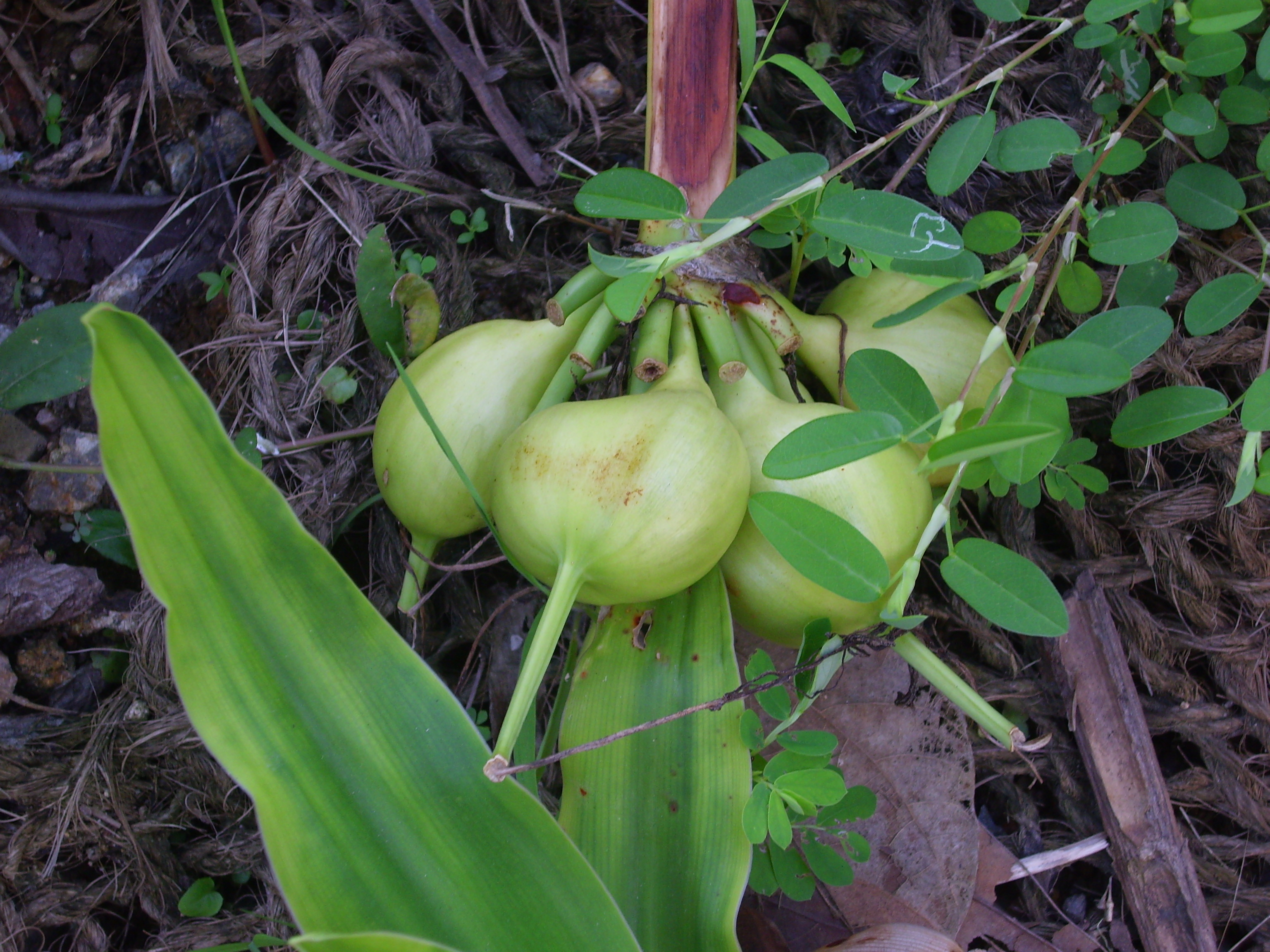 中文（香港）: 文殊蘭的果實